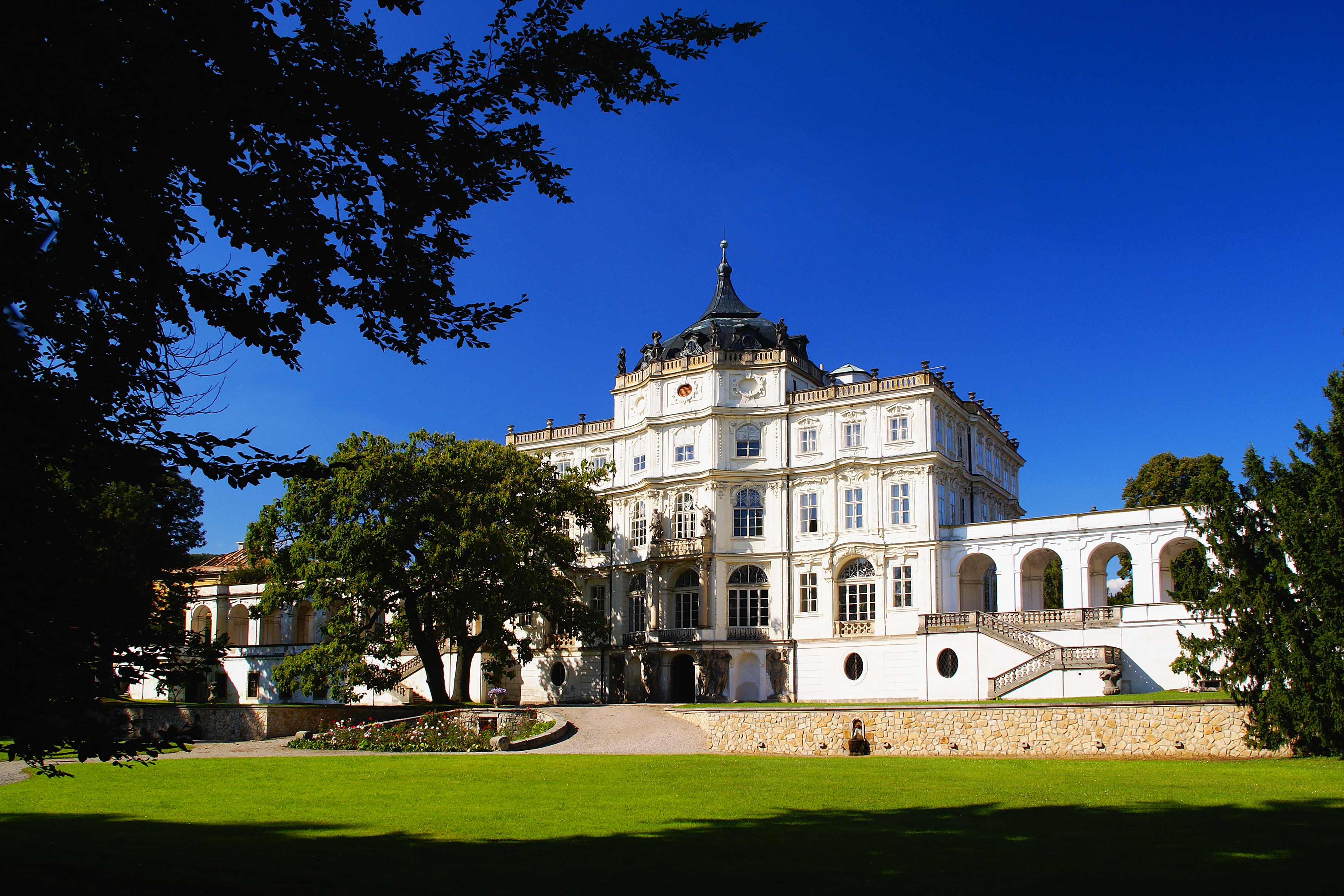 Barokní zámek v Ploskovicích u Litoměřic.